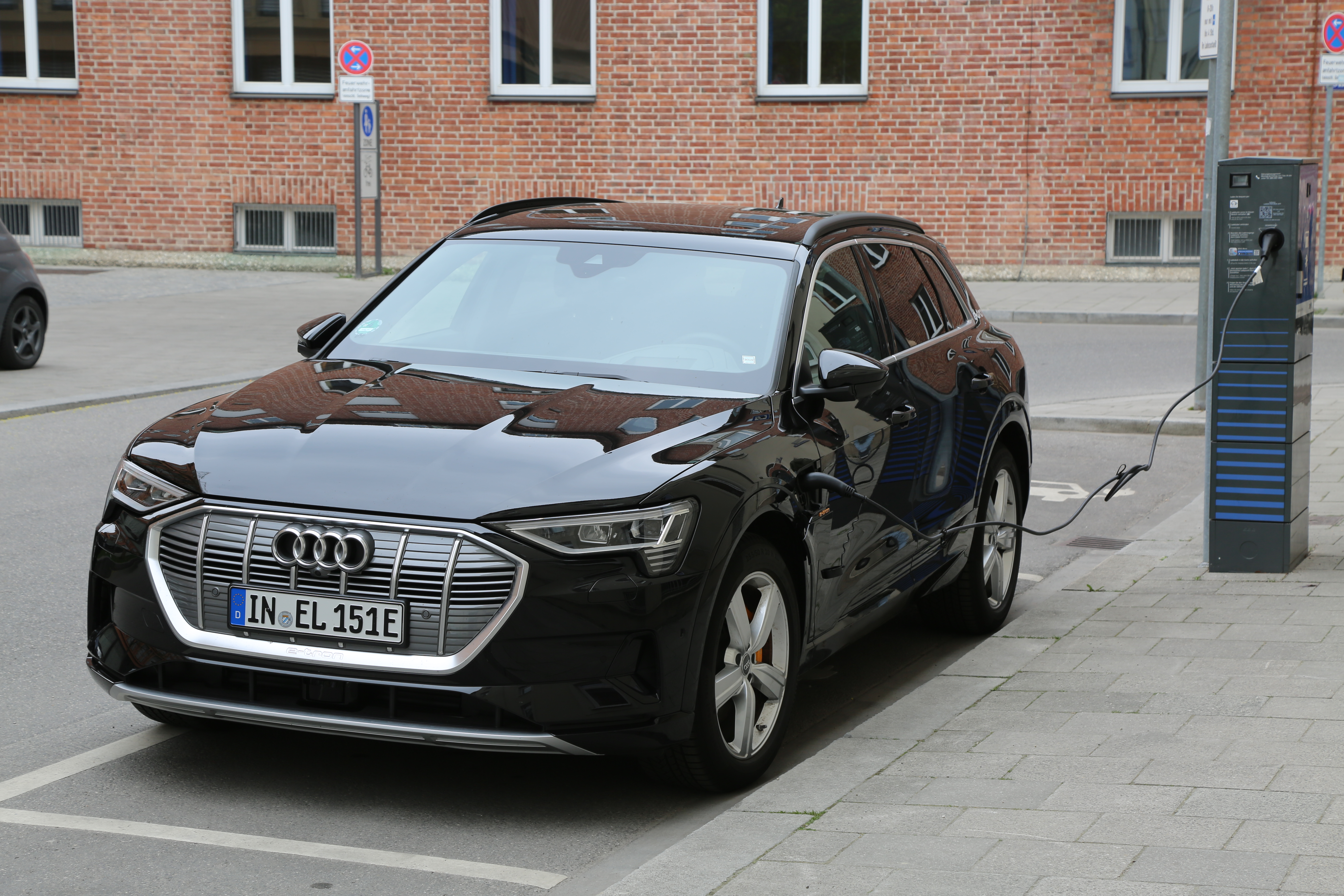 Der Audi e-tron 55 quattro ist das erste reine Elektrofahrzeug von Audi.